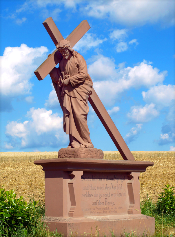 Schau hinein in diesen Spiegel und thue nach dem Vorbild, welches dir gezeigt worden ist auf dem Berge. Errichtet von Franz Greulich im Jahr 1889. Gefert. von J.Haas in Boxthal